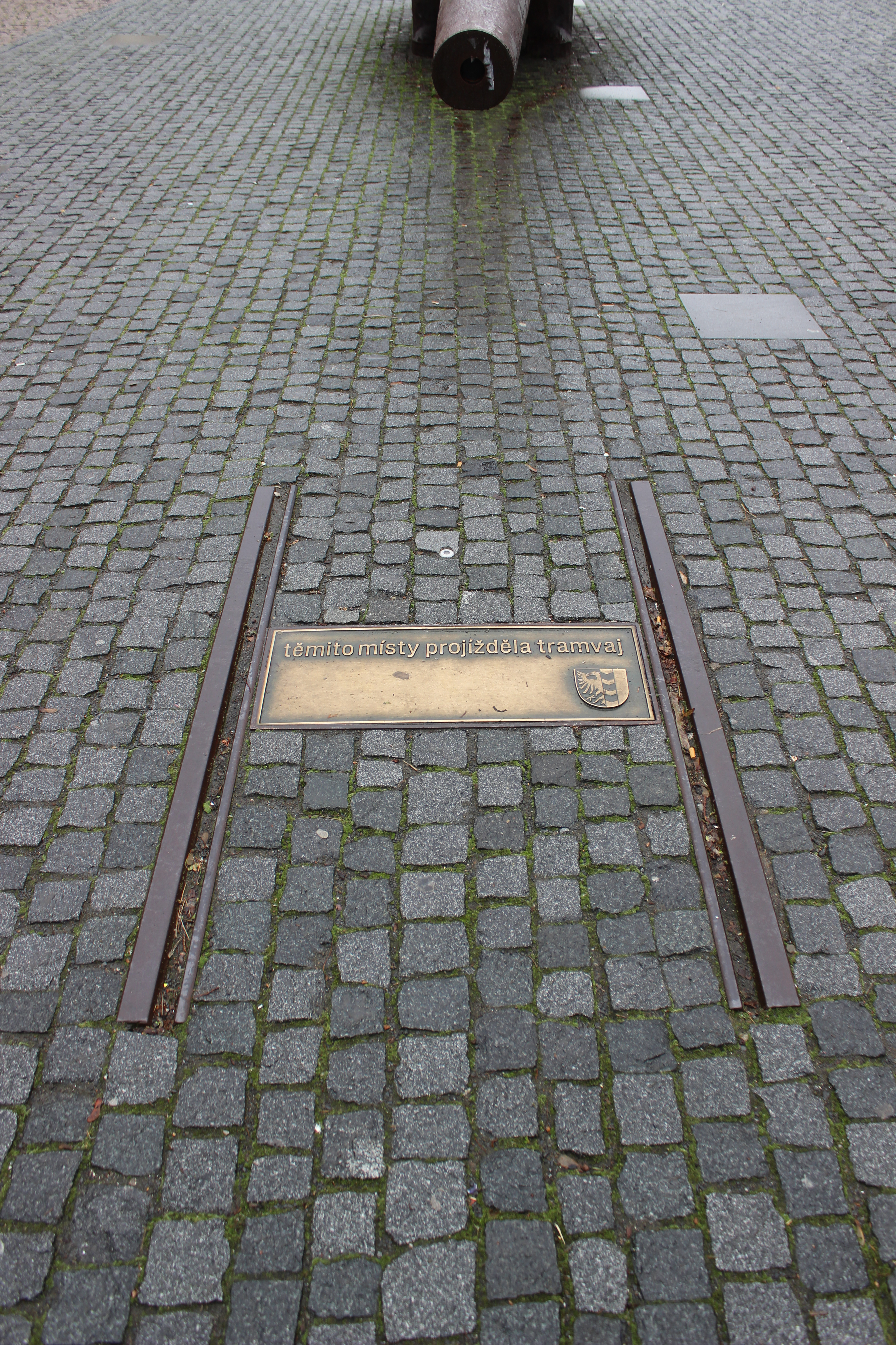 Pozůstatky tramvajových kolejí na opavském Dolním náměstí.